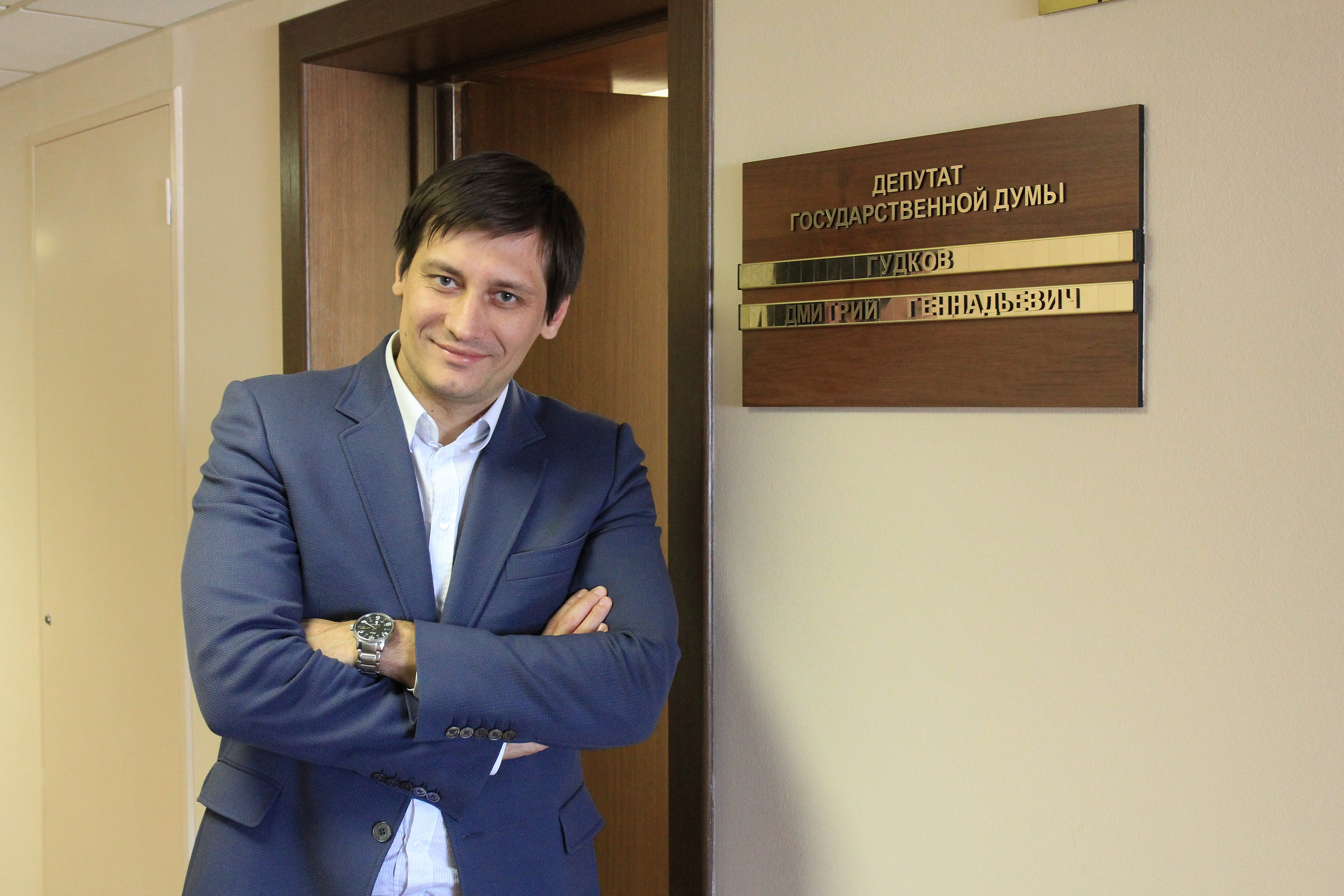 Депутат Государственной Думы VI созыва Дмитрий Гудков у дверей своего кабинета в Госдуме.